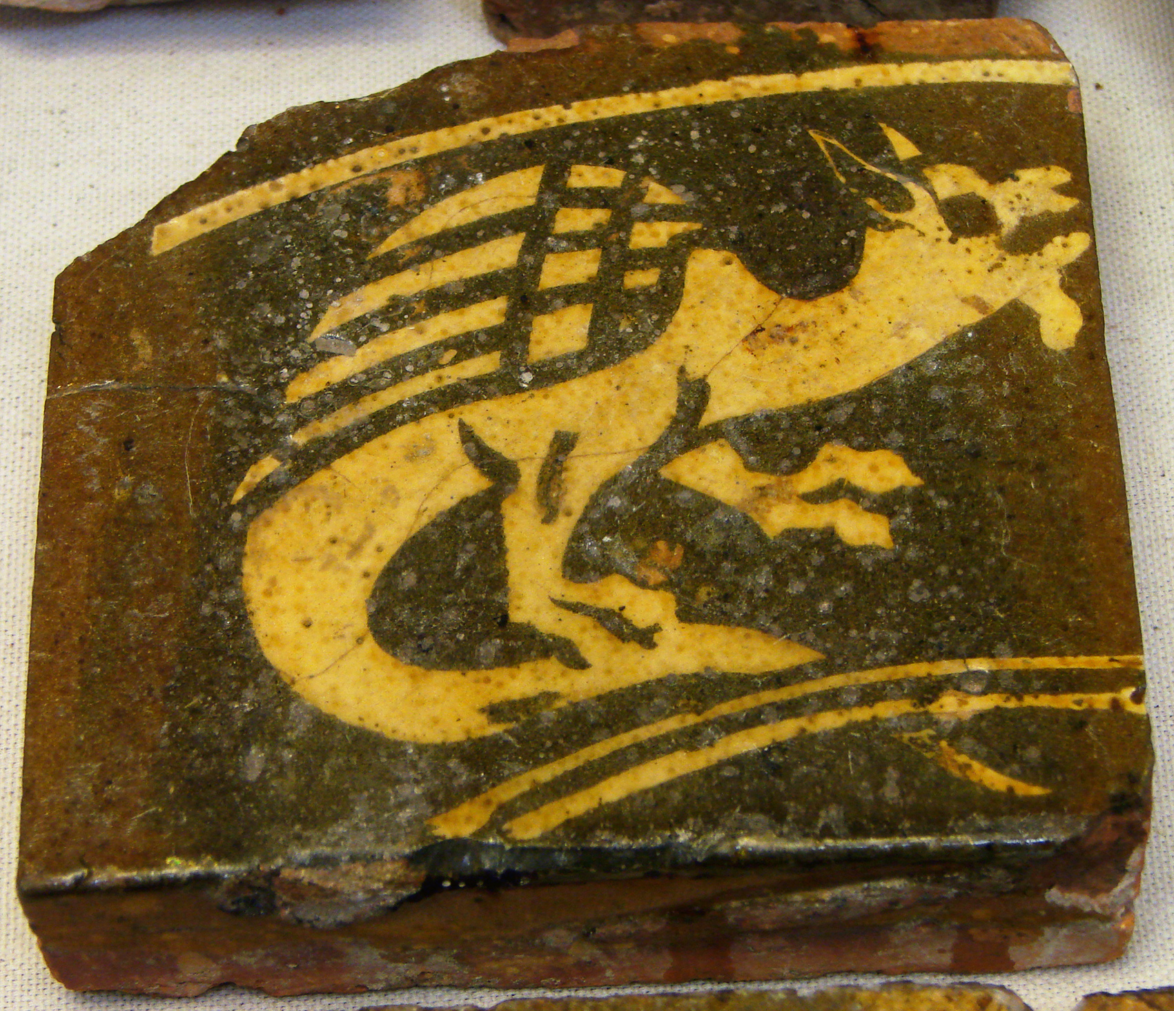 Carreau de pavement, terre glaçurée, époque médiévale (13ème-15ème siècle), provenant de Senlis, Laon ou les environs. Musée de Laon.